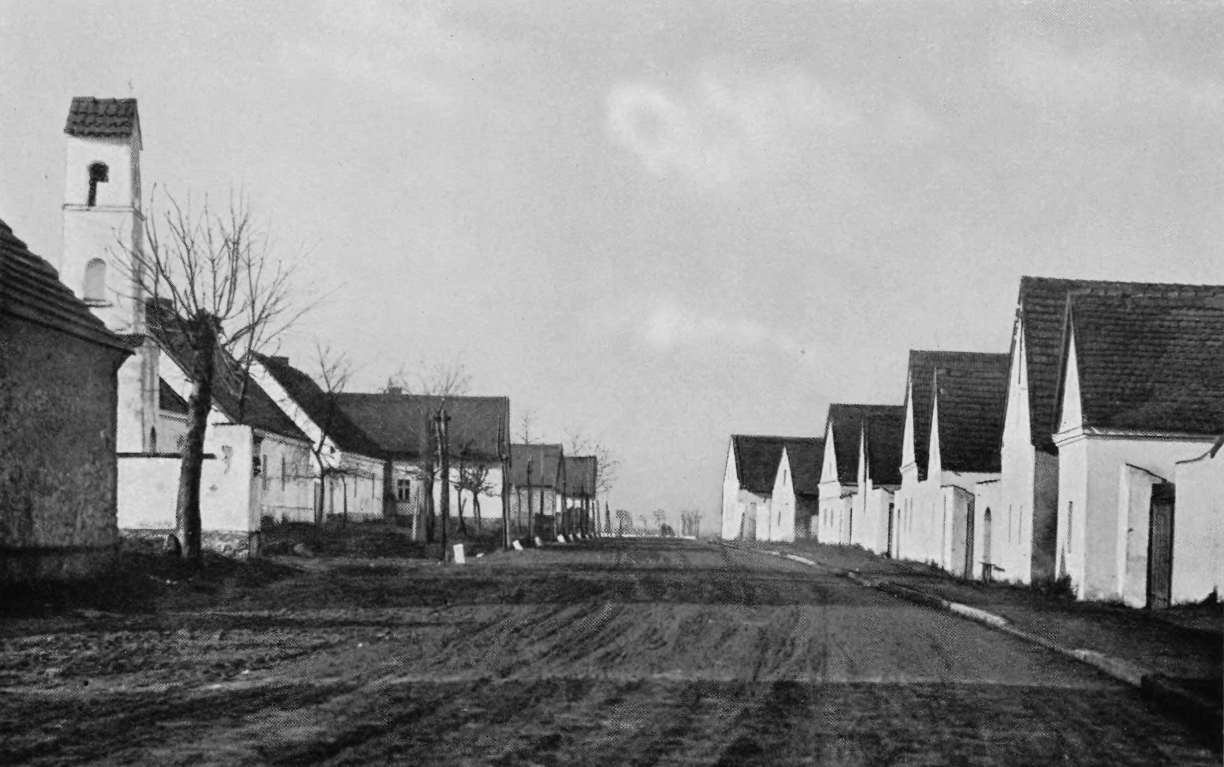 Dorfanger in Kossorowitz